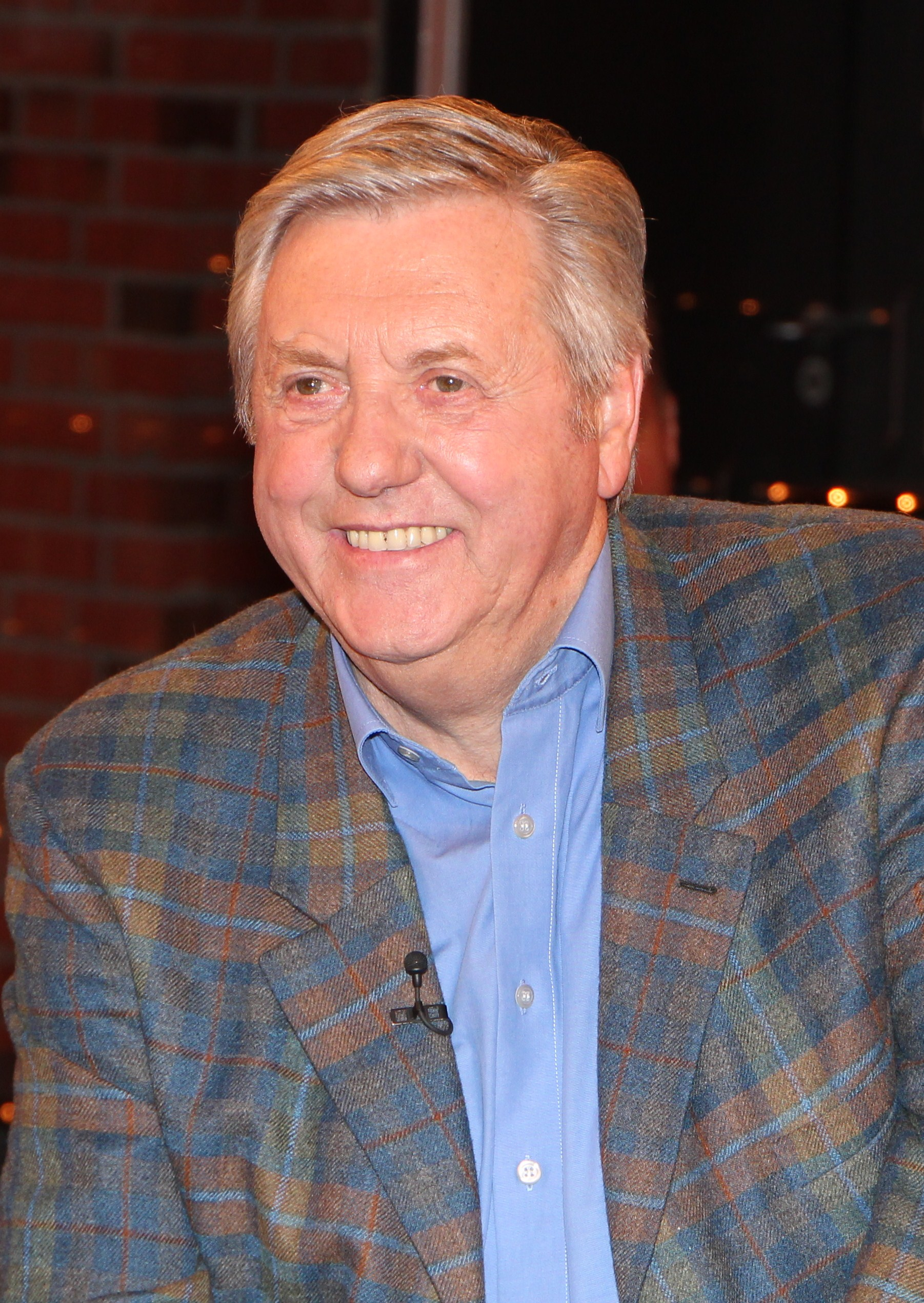 Karl Moik (* 19. Juni 1938 in Linz) ist ein ehemaliger österreichischer Fernsehmoderator und Entertainer.